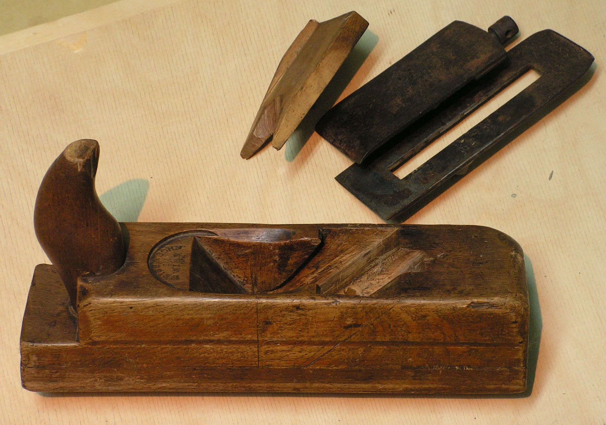 Strug gładzik. Rozłożony na części. Widoczne: korpus, ostrze, nakładka i klin.